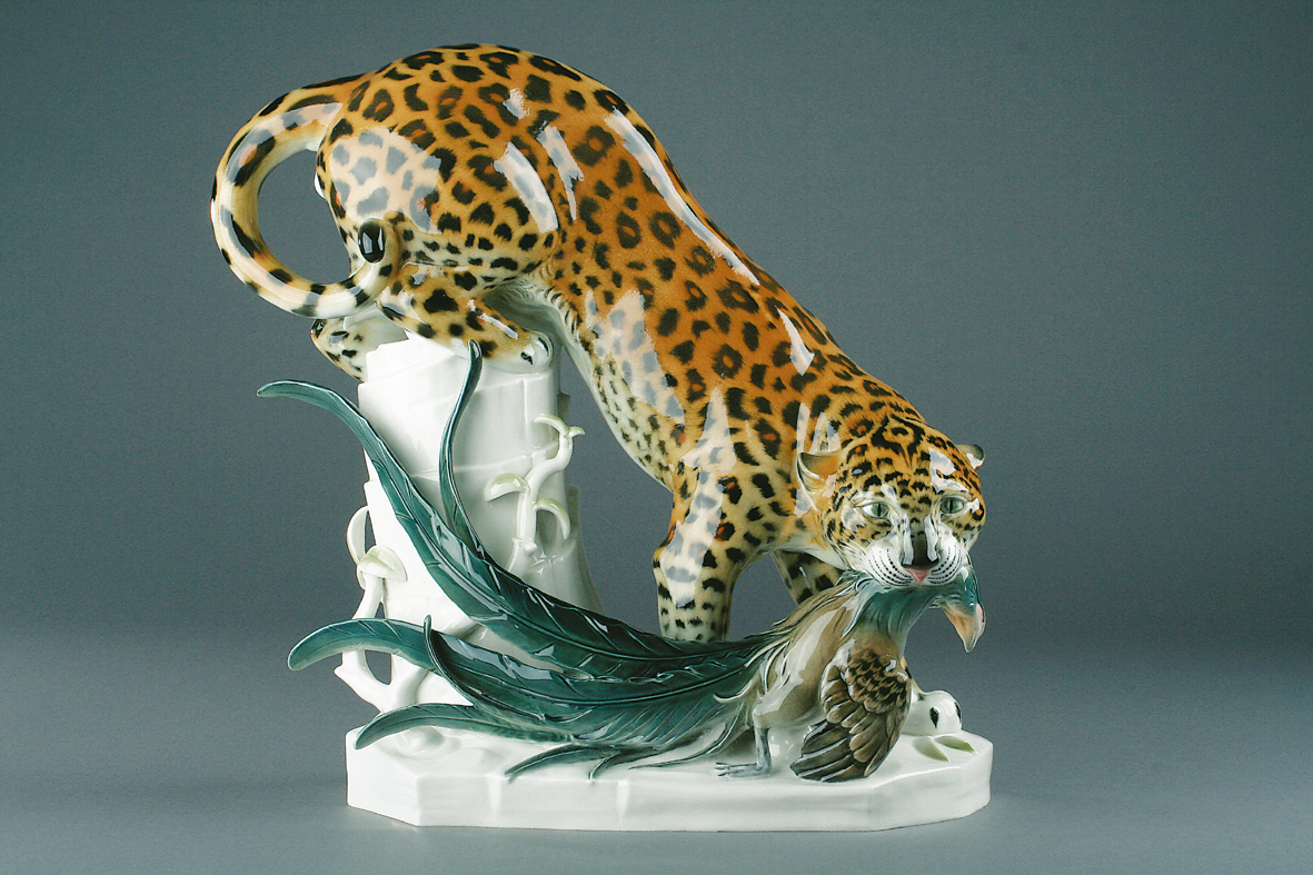 Fasanenraub, lizenziert auf Seltmann Weiden